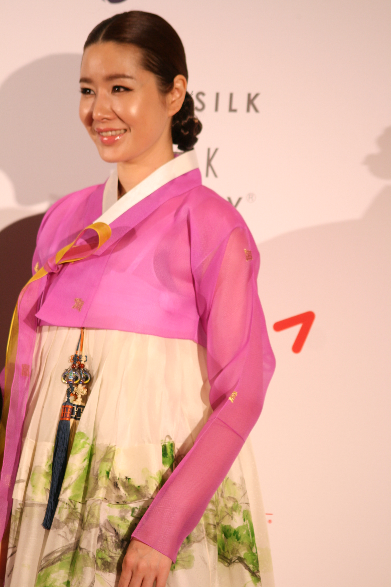 2011 라이프 스타일 어워드